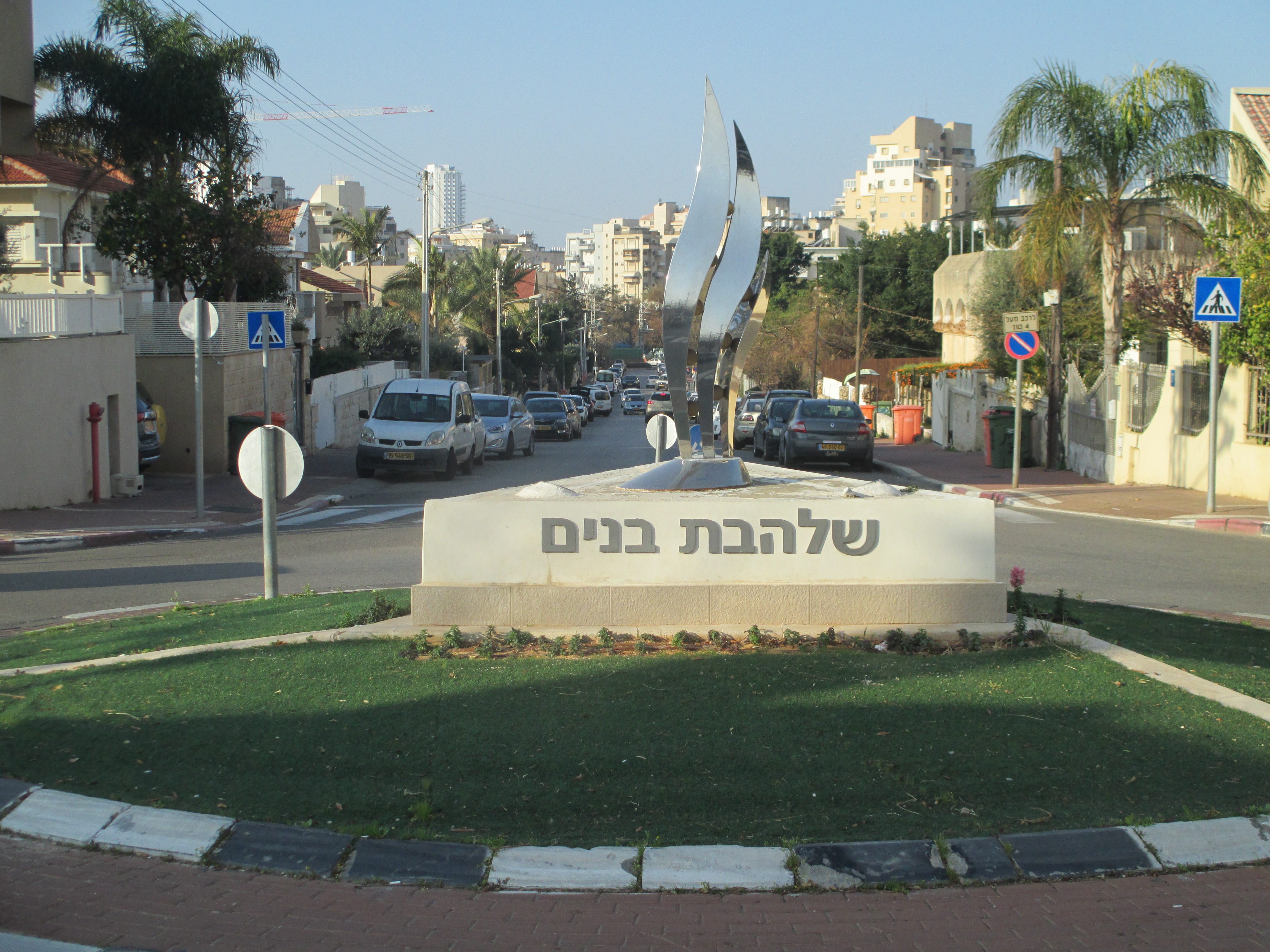 פסל שלהבת בנים ברחוב שרת בנתניה